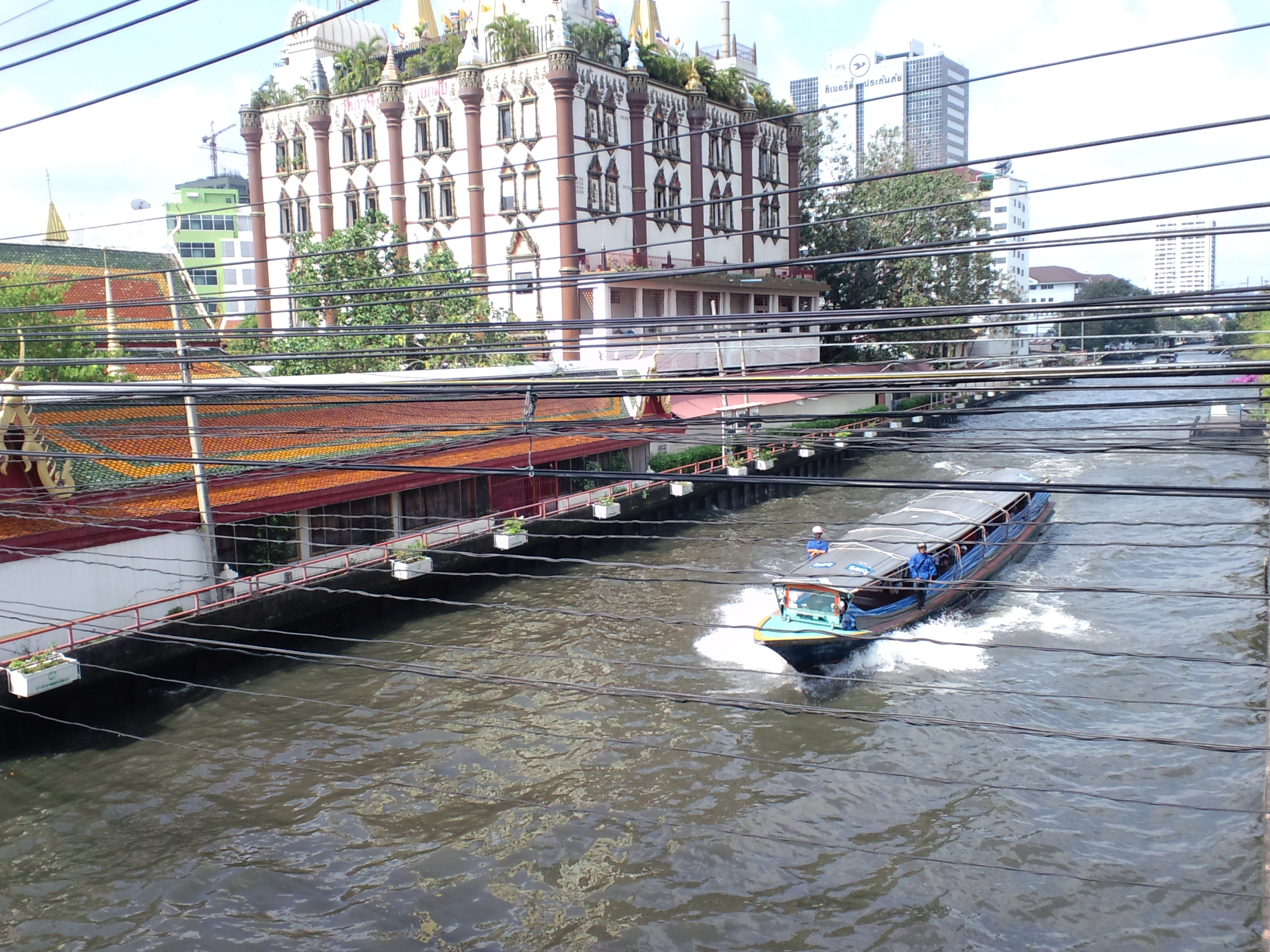 Bang Kapi, Huai Khwang, Bangkok, Thailand